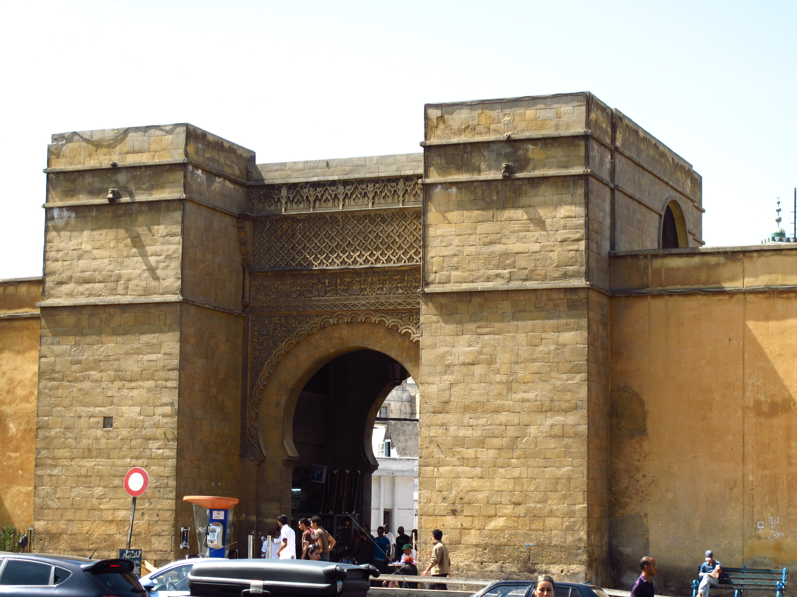 Porte de la médina de Casablanca.